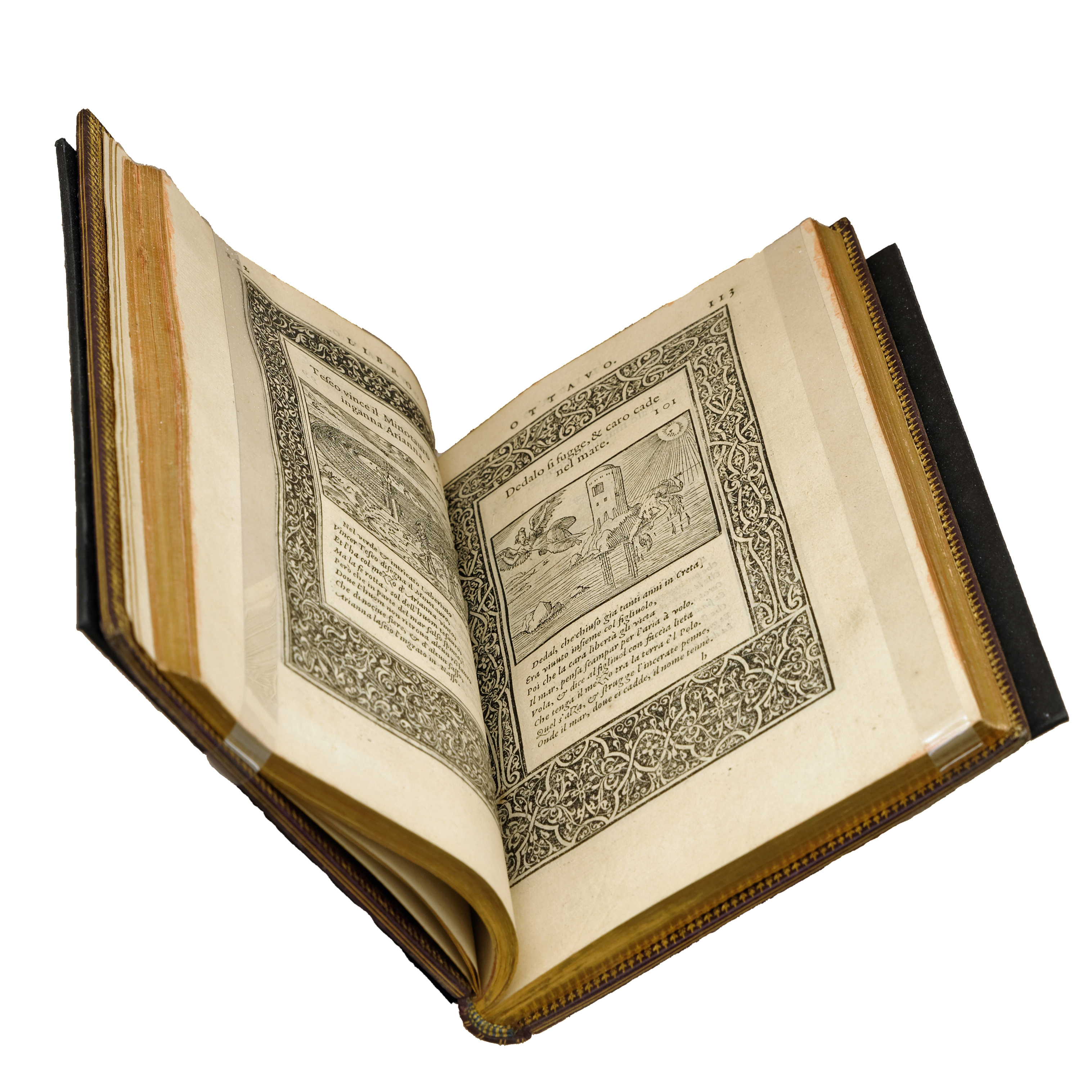 Bernard Salomon (1506-1510 – vers 1561), L’Arche de Noé Gravure sur bois. Dans Claude Paradin, Quadrins historiques de la Bible, imprimé à Lyon, chez Jean de Tournes, 1555. Lyon, Bibliothèque municipale.